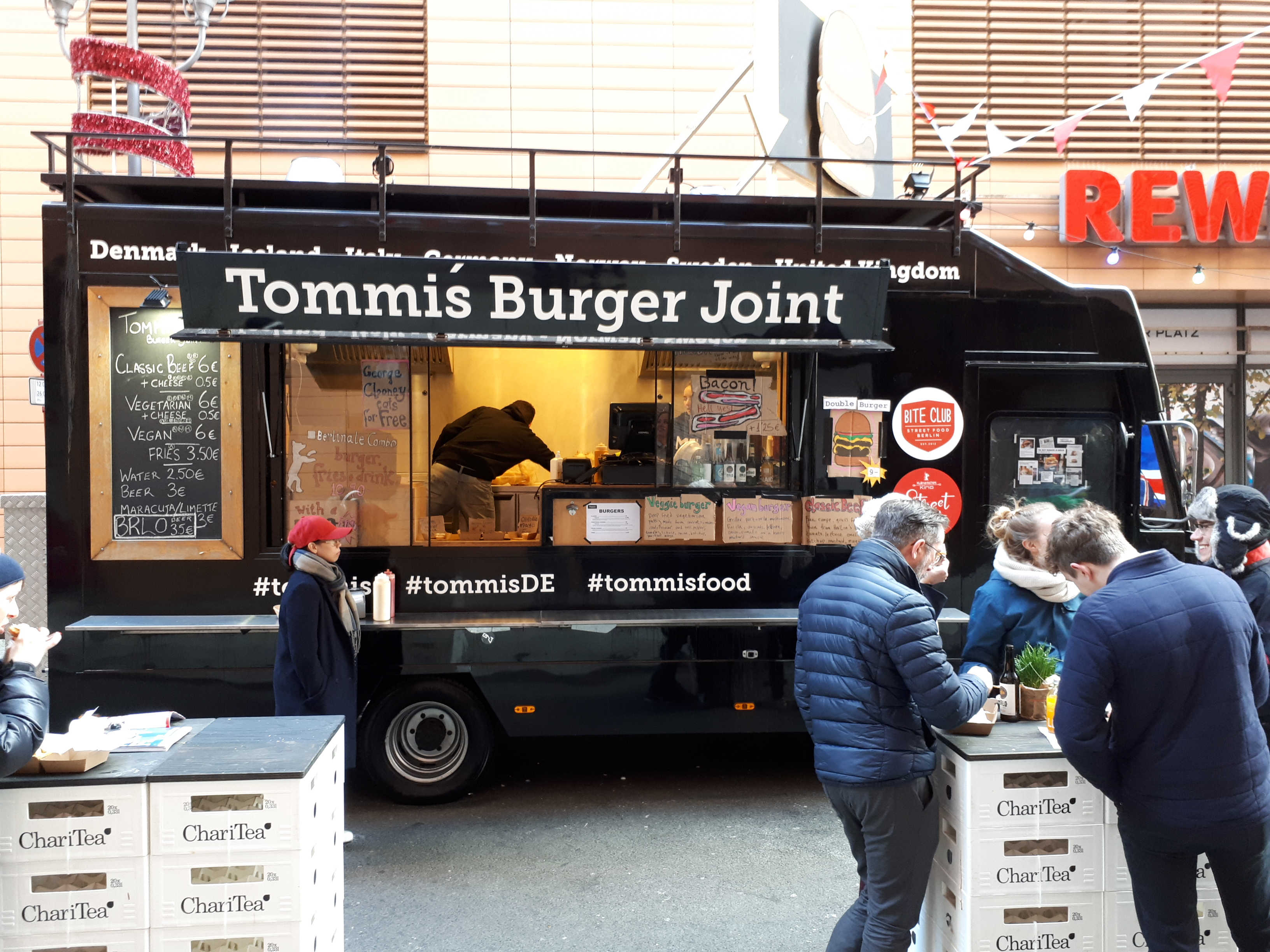 Imbisswagen am Potsdamer Platz anlässlich der Berlinale 2018